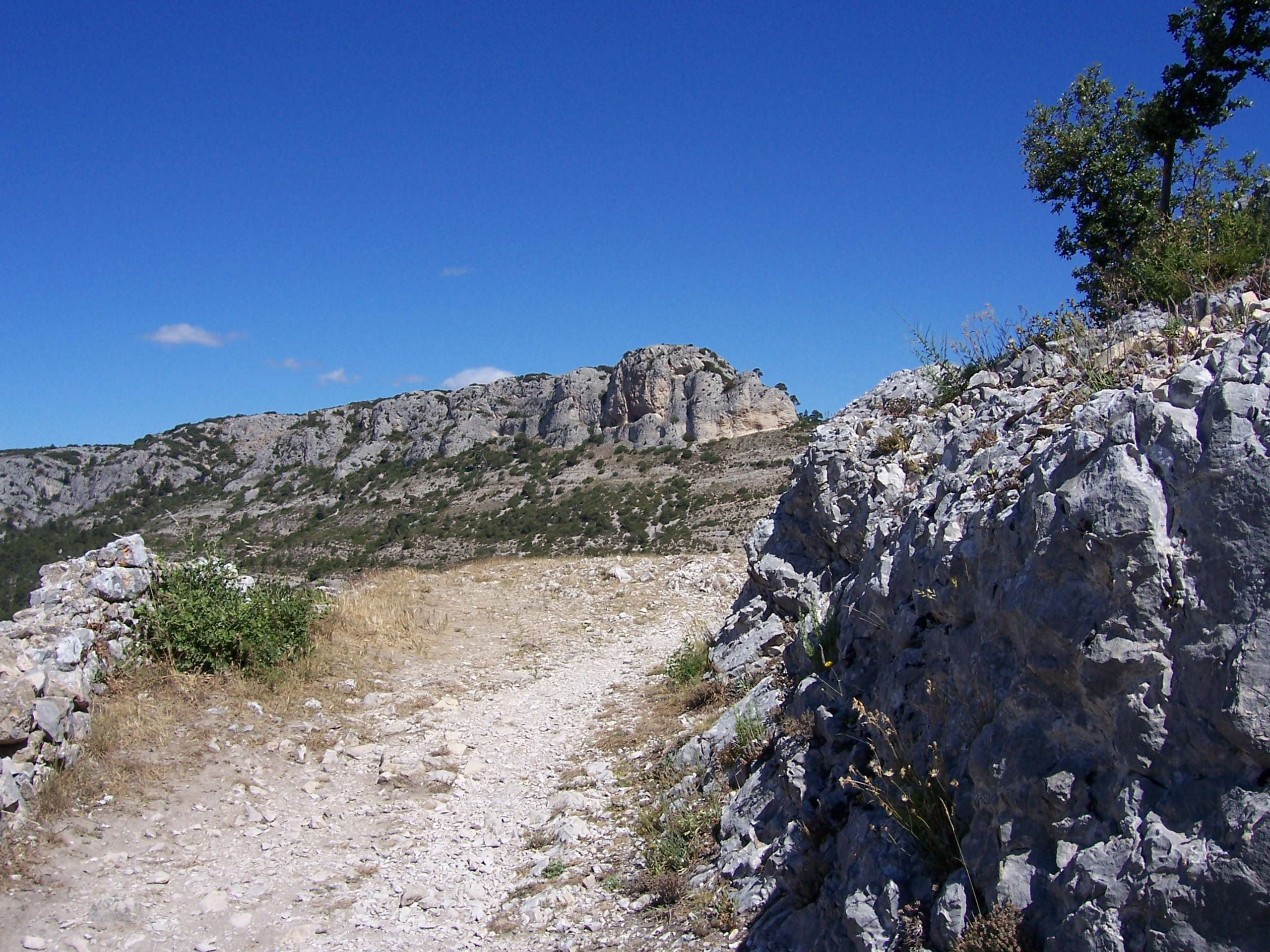 Sur le chemin de la route du souvenir à Mérindol